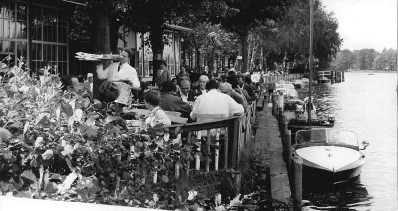 Berlin, Gaststätte "Neu-Helgoland" Zentralbild Franke 2.6.1968 Berlin: Pfingsten ins Grüne ! Viele Berliner zogen während der Pfingsttage hinaus ins Grüne - auch in der Gaststätte Neu-Helgoland herrschte Hochbetrieb.